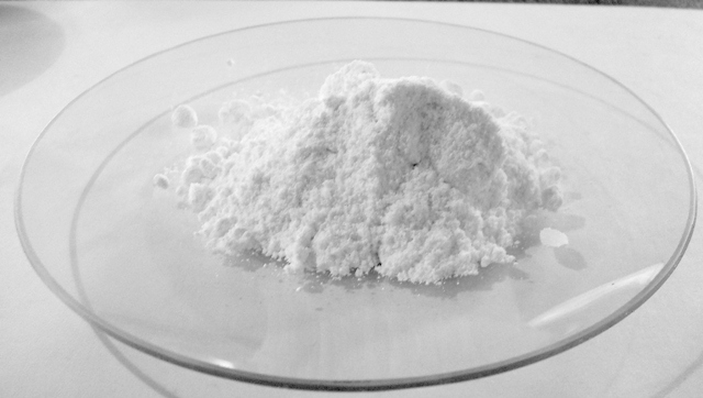 Na2CO3